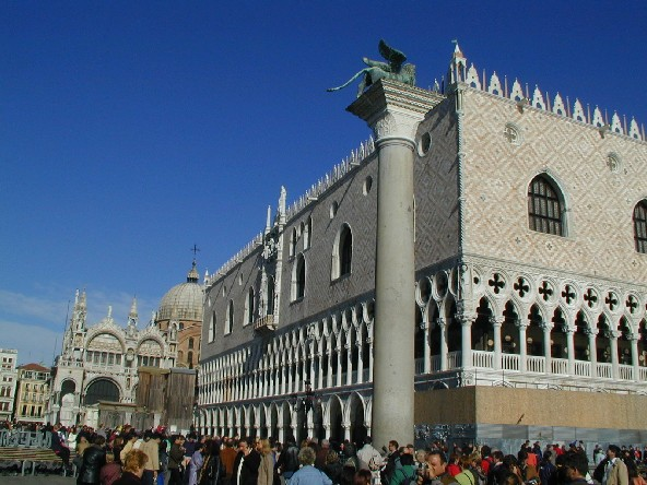 Palazzo Ducale. La foto è stata scattata da me il 2.11.01